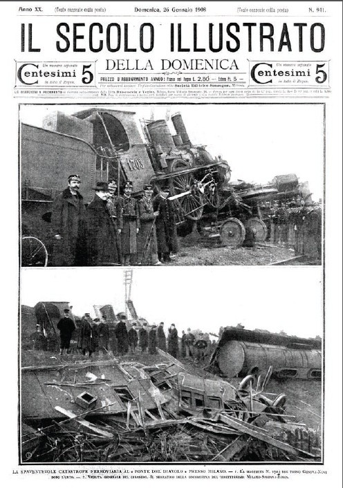 Copertina del Secolo Illustrato della Domenica del 26 gennaio 1908: il disastro ferroviario dell'Acquabella, Milano.